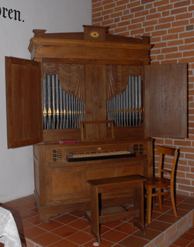 Orgel in Gandersum